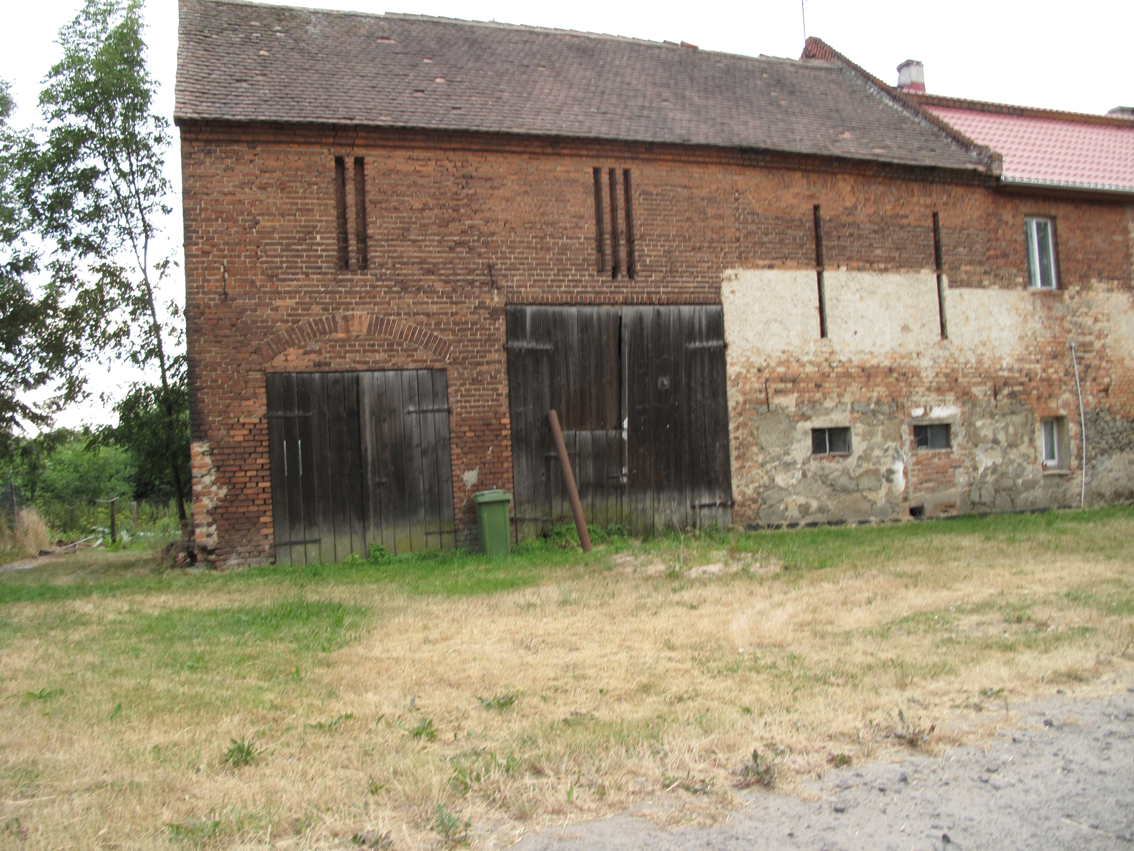 Łowin (województwo dolnośląskie). Polska.